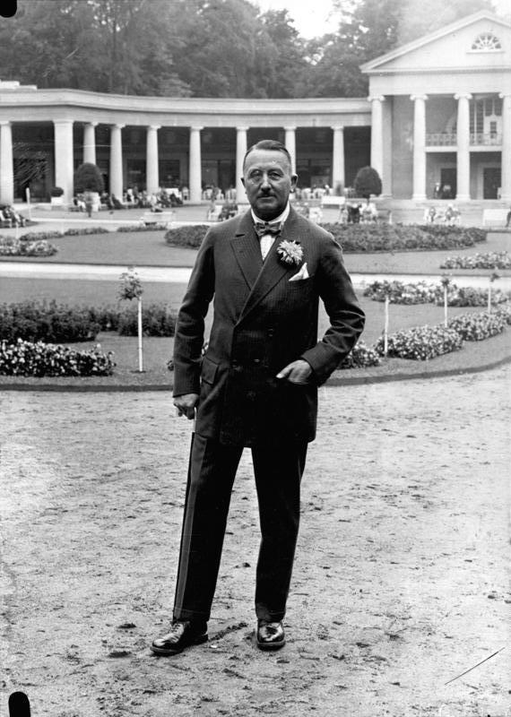 General von Pawelsz sein Hauptzeuge in dem Femeprozeß in Stettin! General von Pawelsz dessen Zeugenaussagen im Femenprozess in Stettin von großer Wichtigkeit sind.